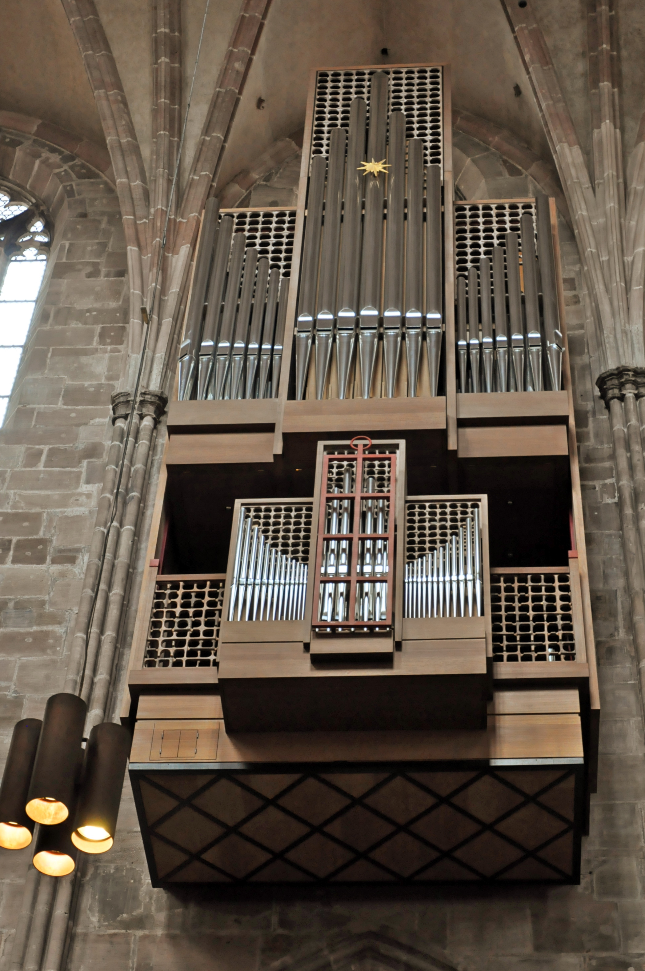 Laurentiusorgel in der Lorenzkirche Nürnberg